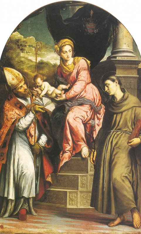 Paris Bordon - Madonna con Bambino in trono tra Sant'Enrico d'Upsala e Sant'Antonio da Padova anno:1550-1555 olio su tela - 91 x 114 cm Pinacoteca di Bari